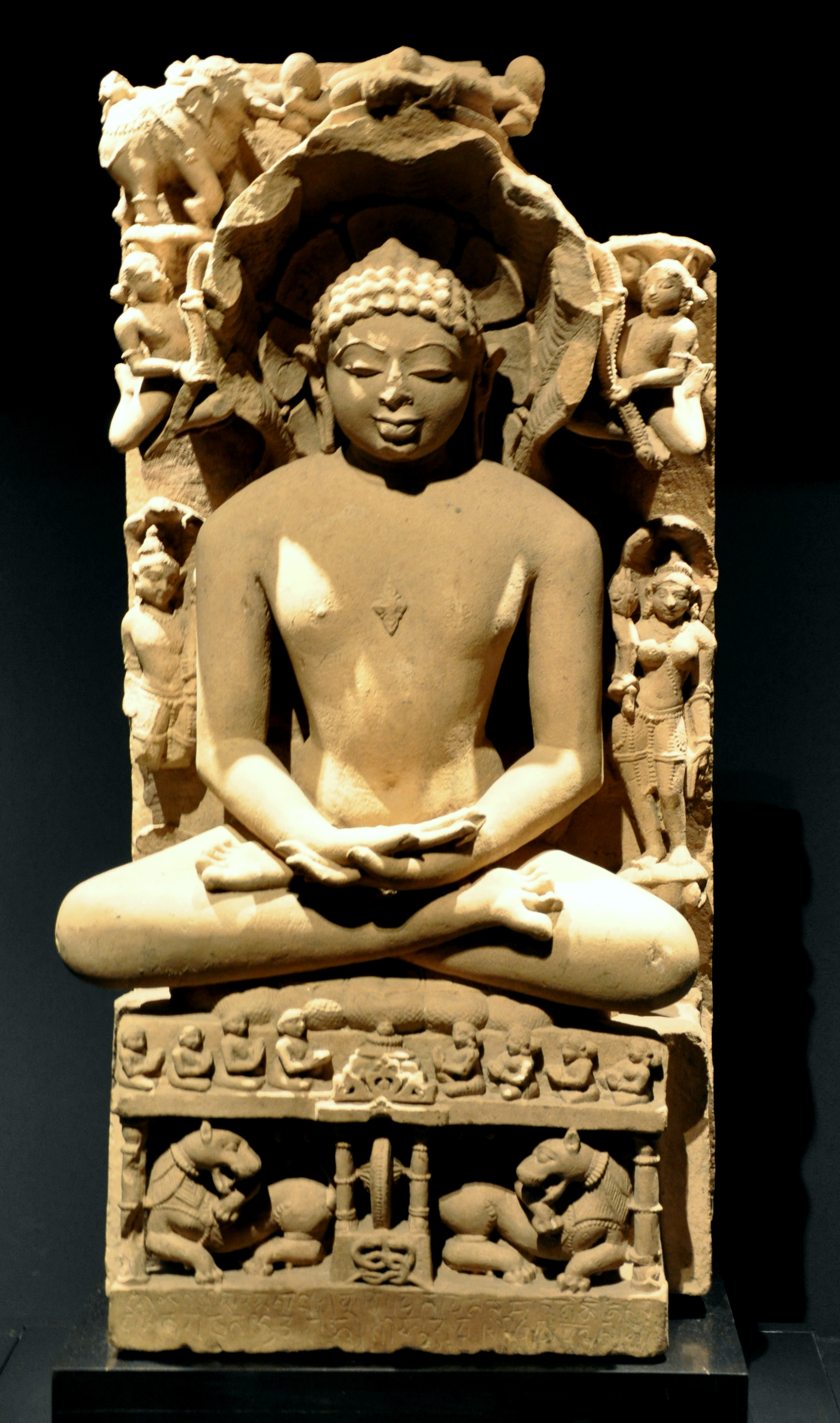 Tirthańkara Pārśvanātha (der 23. in der Reihe der Jinas, mit siebenköpfiger Schhlangenhaube); Sandstein; Rajasthan, Indienn, 10.–11. Jahrhundert; Linden-Museum Stuttgart, Inv. SA 01727 L